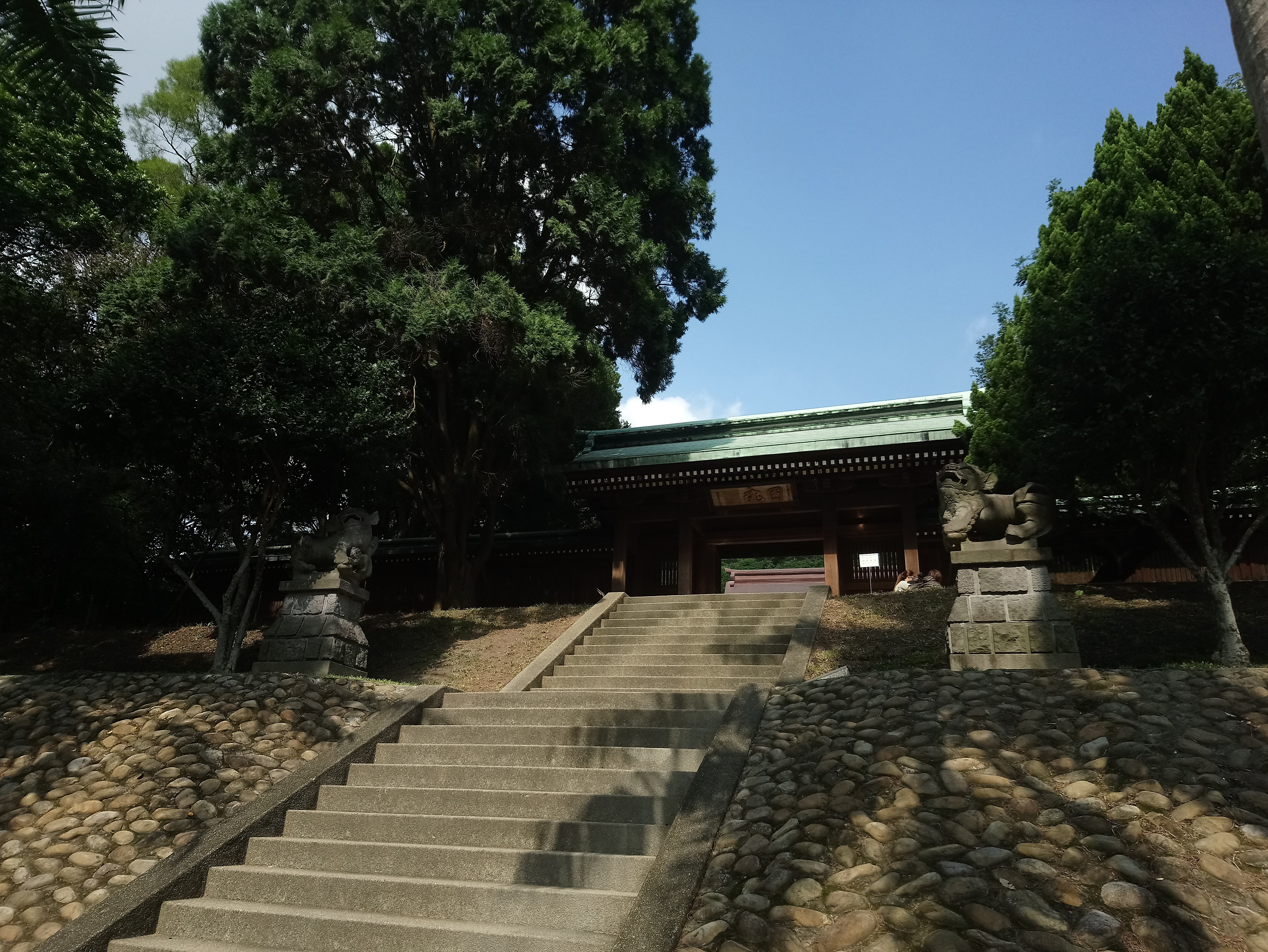 桃園神社神門,桃園市桃園區大會稽次分區三元里